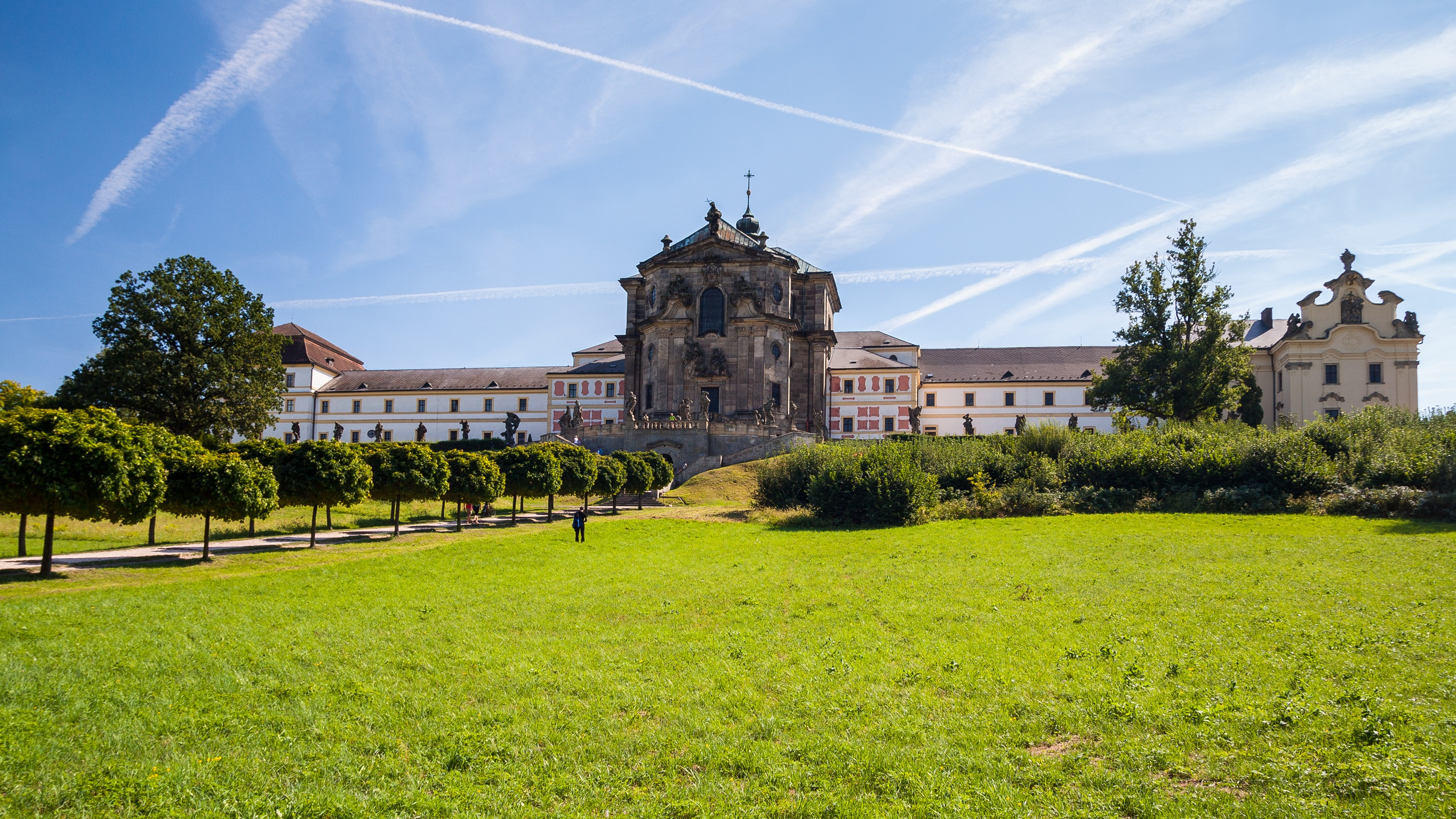 Špitál - hospital Kuks (Kuks), Kuks 81, Kuks.